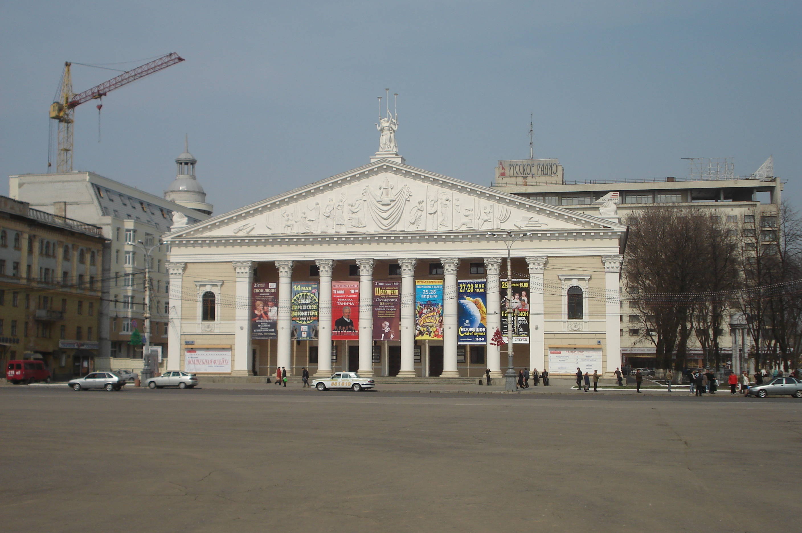 Воронежский государственный театр оперы и балета